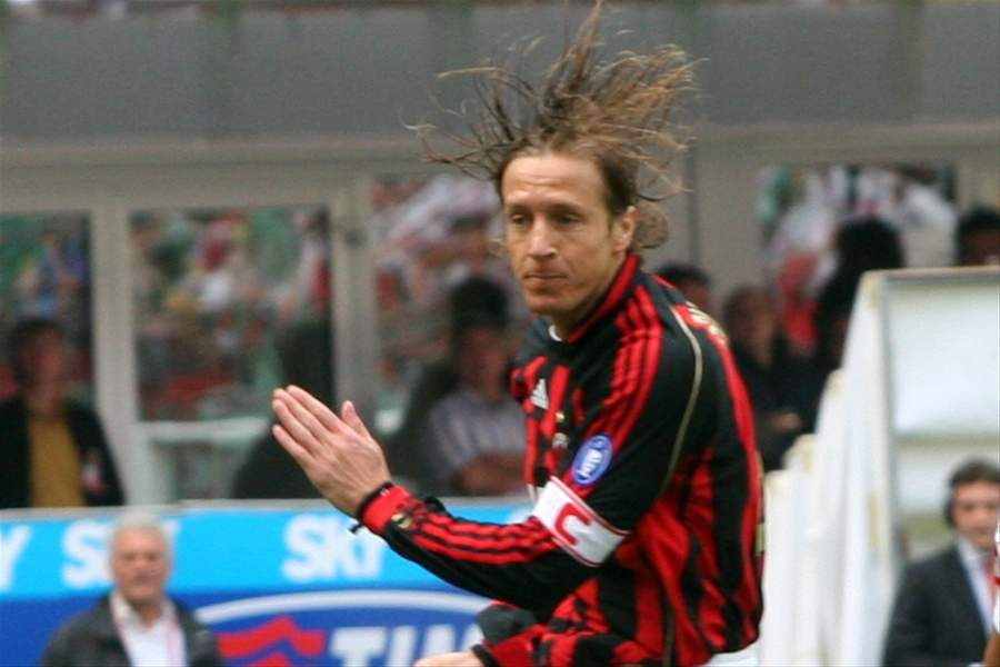 Massimo Ambrosini